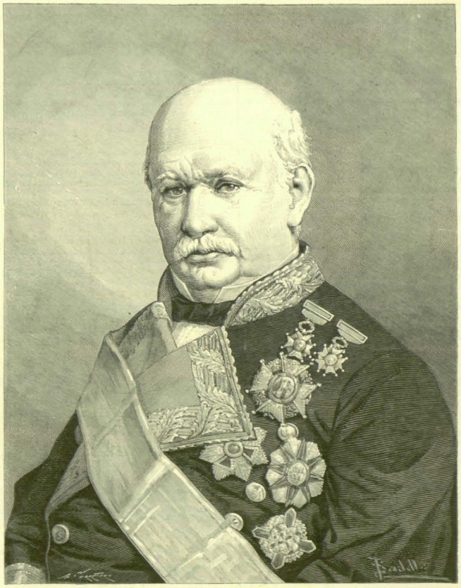 Excmo. Sr. D. Fernando Fernández de Córdova y Valcárcel, Marqués de Mendigorría. Nació en Buenos Aires en 1809; falleció en Madrid, el 30 de octubre último.